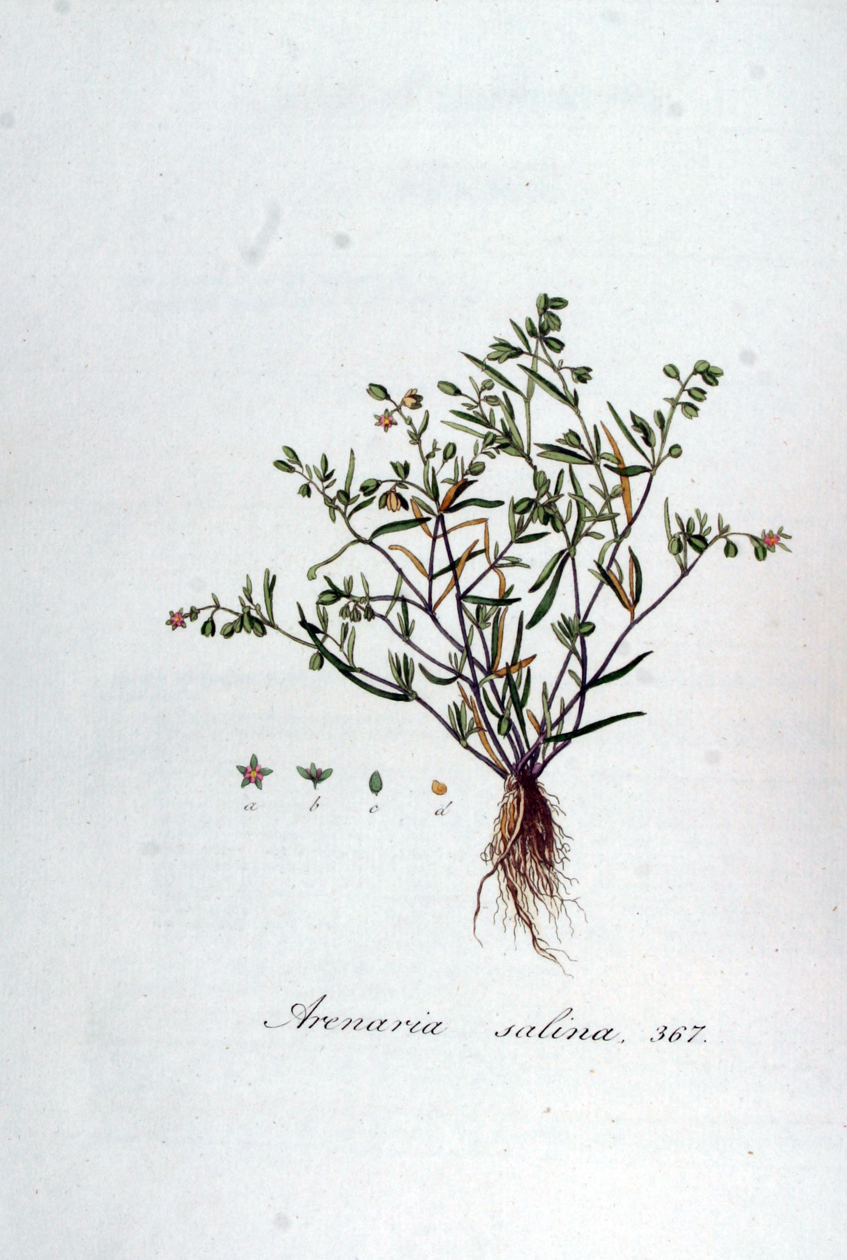 Spergularia marina (L.) Besser (Syn. Arenaria salina Ser.)